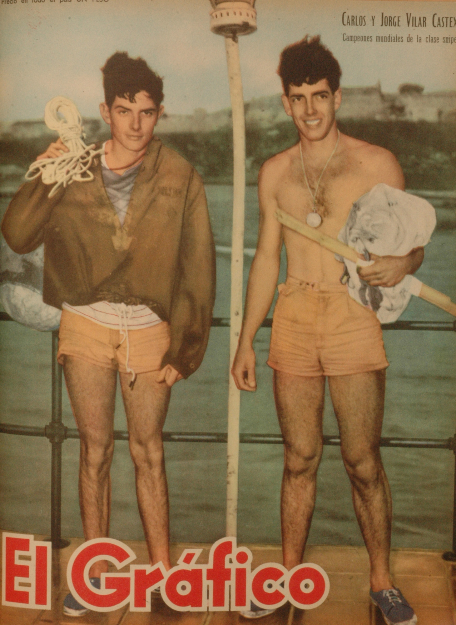 El Grafico del 04 de Enero de 1952. Edicion 1691